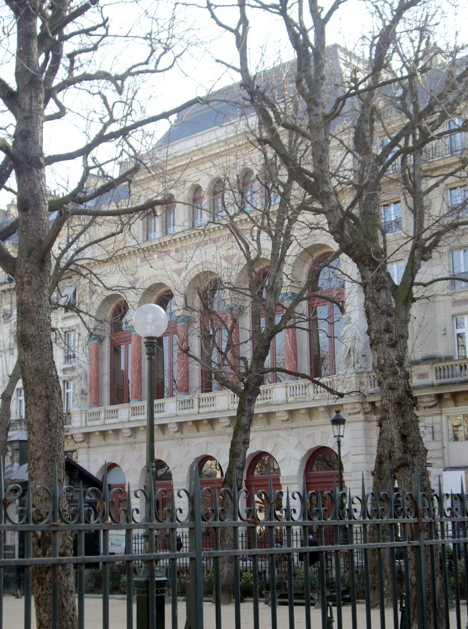 Théâtre de la Gaîté, 3 bis rue Papin, Paris 3e. Vu depuis le boulevard de Sébastopol.